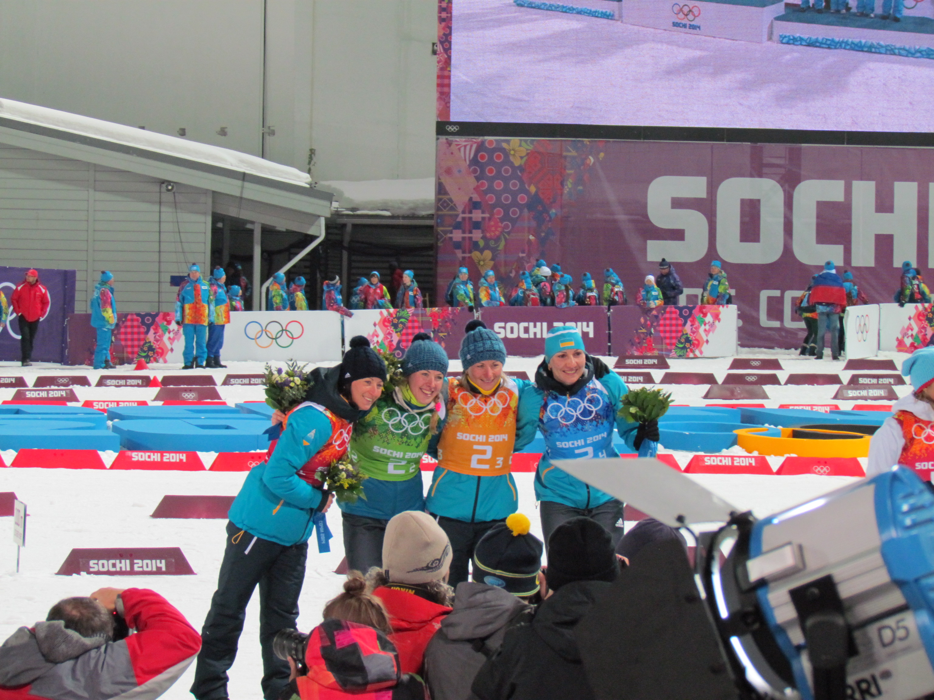 Зимові Олімпійські ігри 2014. Біатлон, жіноча естафета. Квіткова церемонія